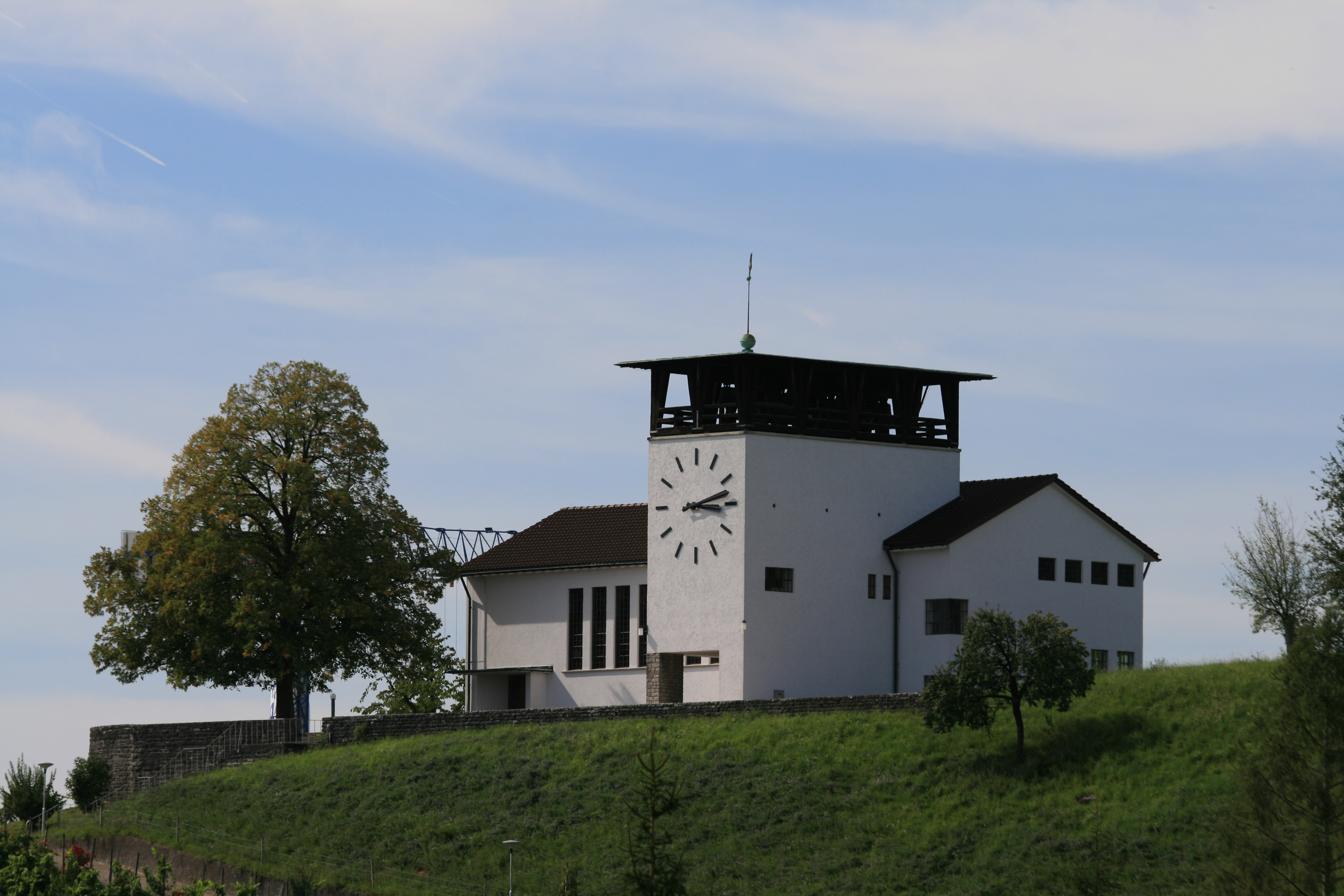 Reformierte Kirche Birmenstorf